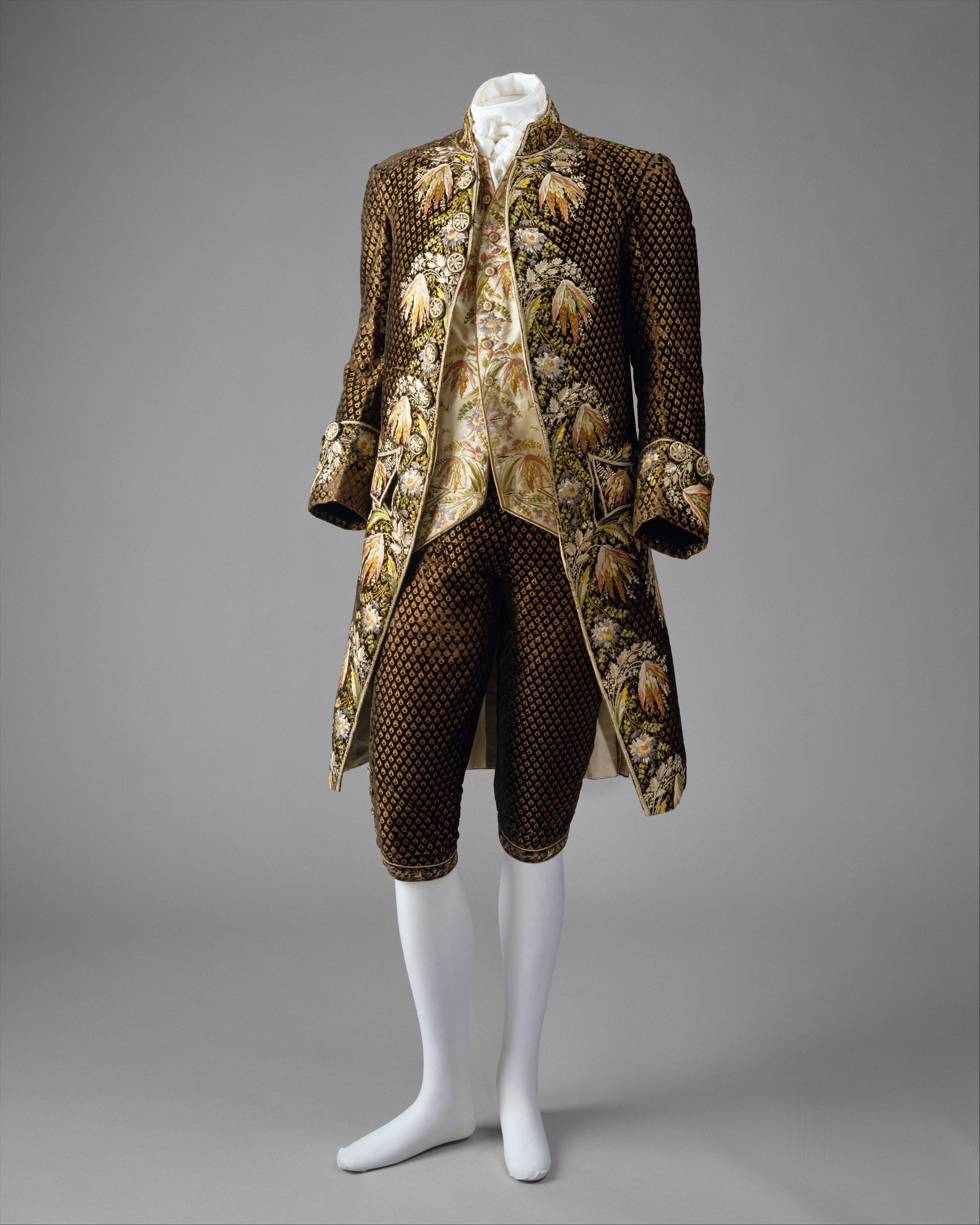 French; Suit